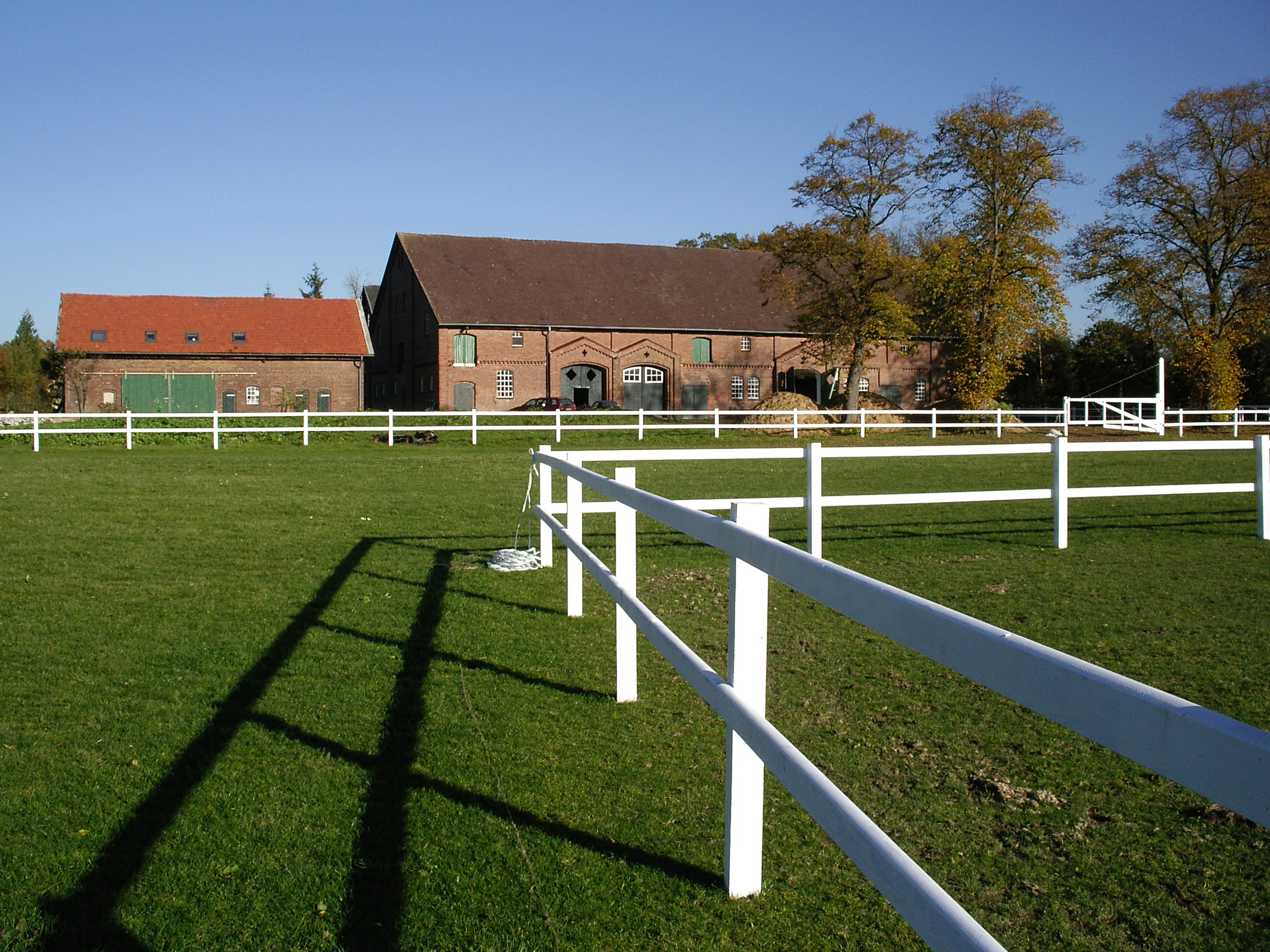 Das Landgut Aspern in Groß Offenseth-Aspern im Juni 2005 bei strahlend-blauem Himmel